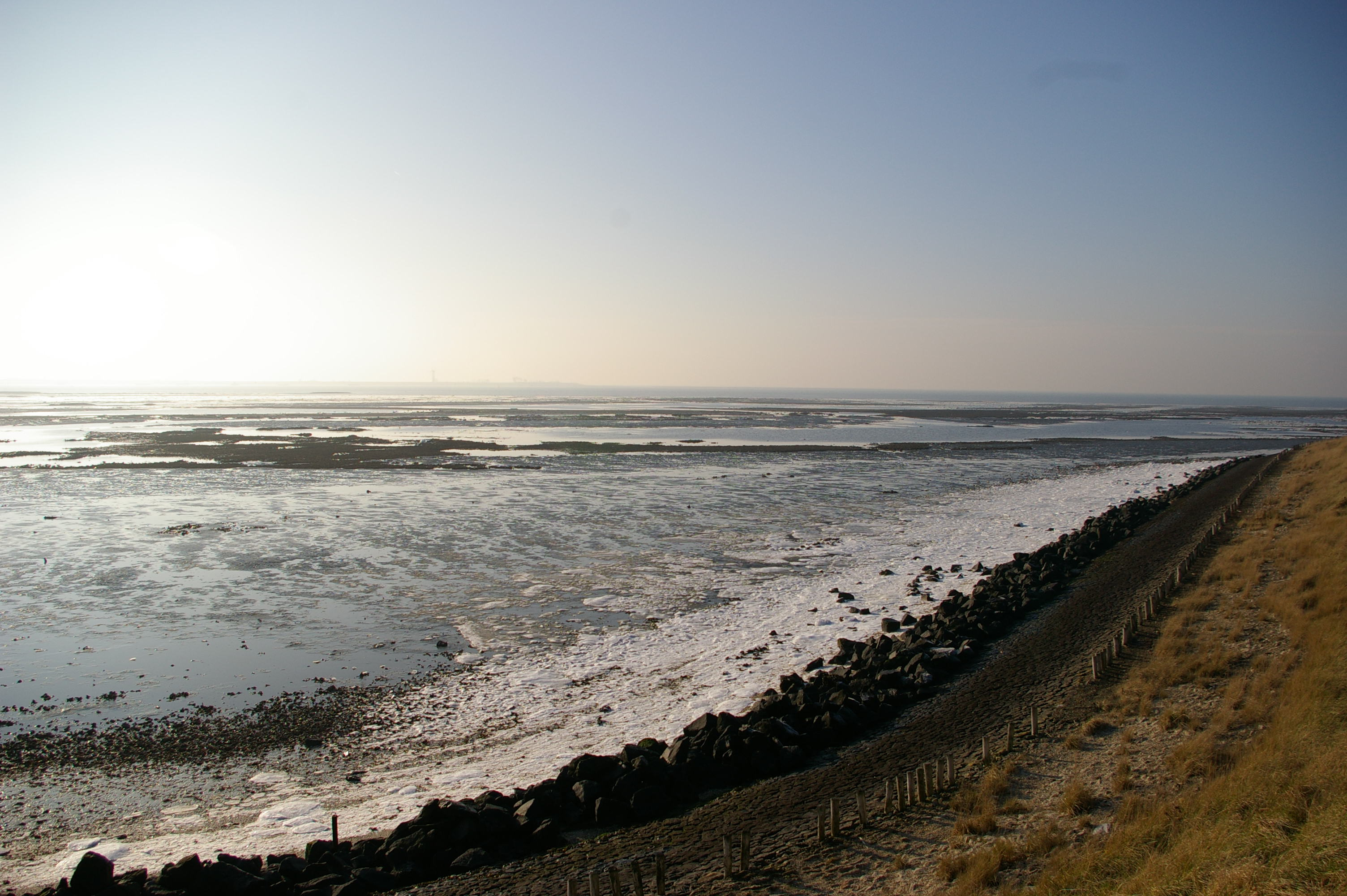 Oosterschelde estuary, at Viane, Zierikzee, the Netherlands. Used on Oosterschelde and Oosterscheldepad.